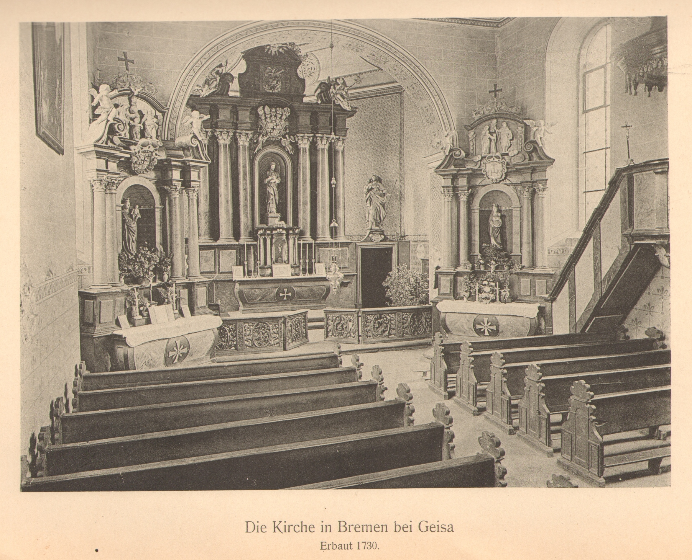 Innansicht der Kirche (um 1911).